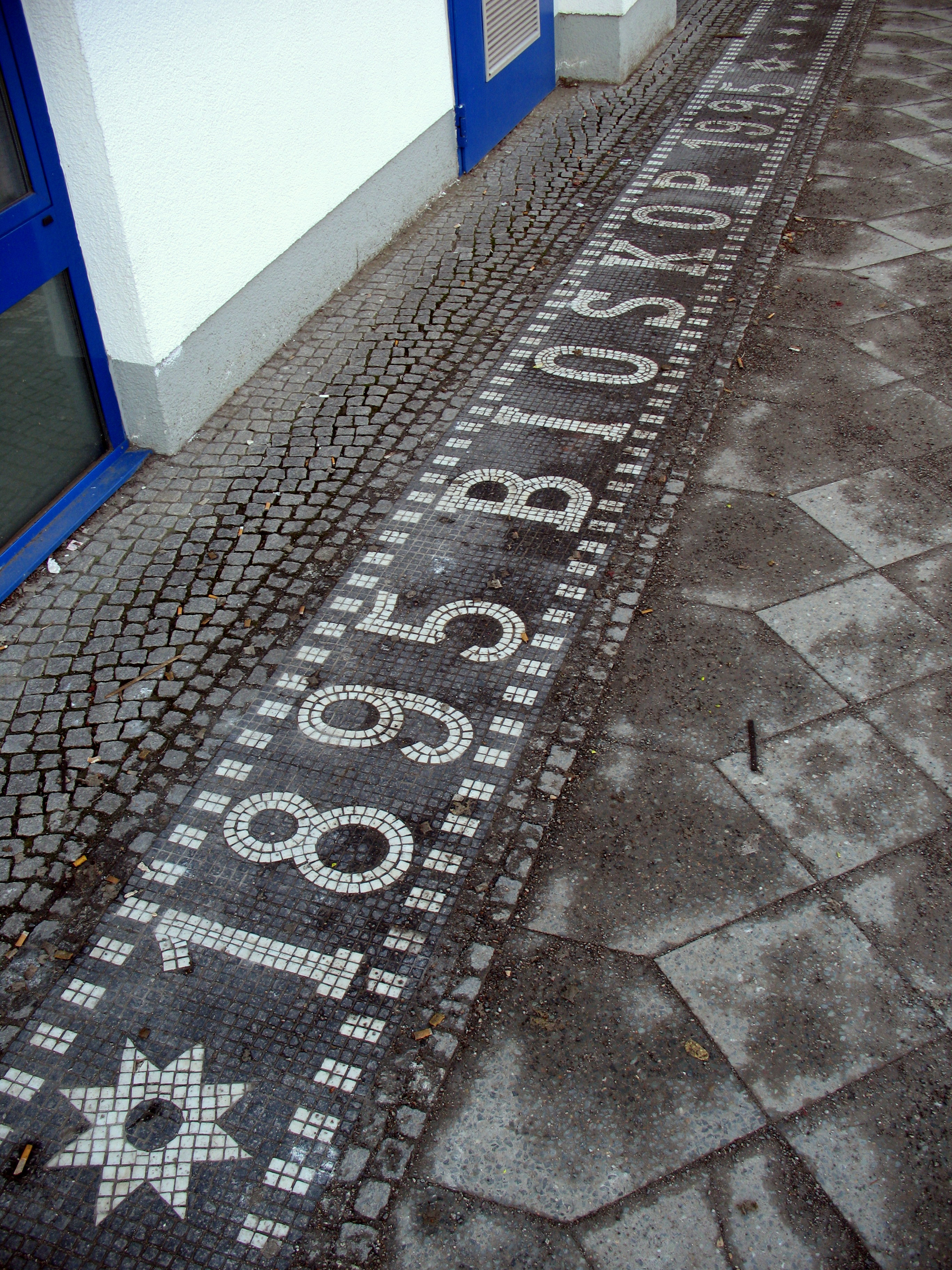 Mosaik zur Erinnerung an das erste deutsche Kino in der Berliner Straße in Berlin-Pankow